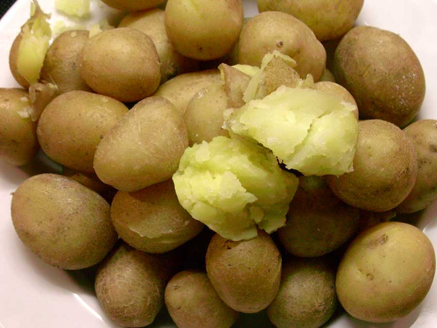 Pellkartoffeln, frisch gekocht